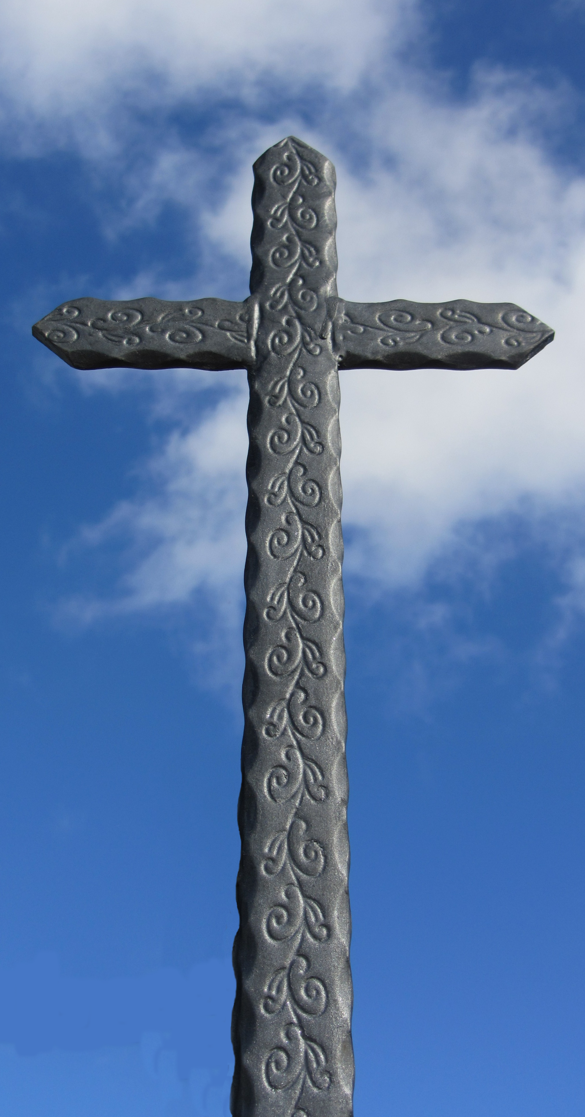 Cuz de hierro forjado en la puerta lateral del cementerio de Vellisca (Provincia de Cuenca - España).